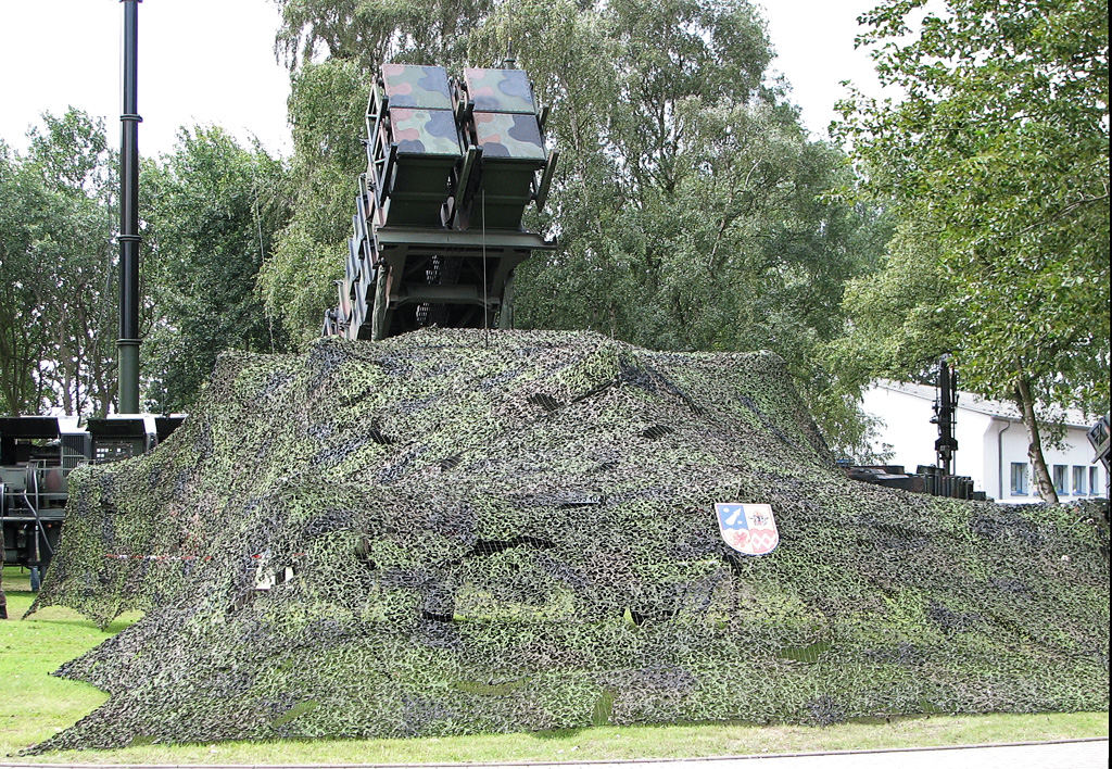 Beschreibung: MIM 104 / Patriot System der Bundeswehr Fotograf: Darkone, 13. August 2005